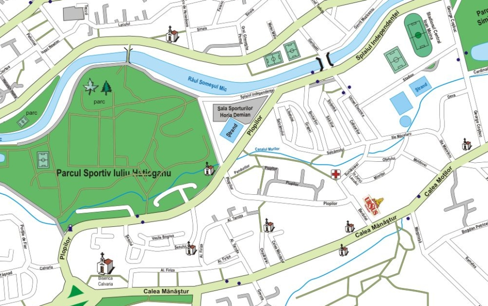 Harta Gradini Manastur, Cluj-Napoca